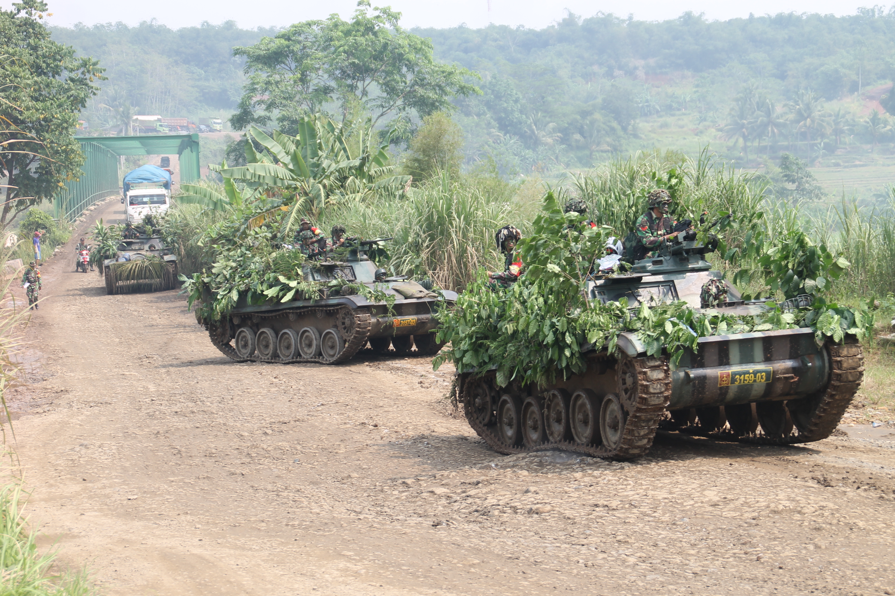 Prajurit Yonkav 9/SDK dengan Tank AMX-13